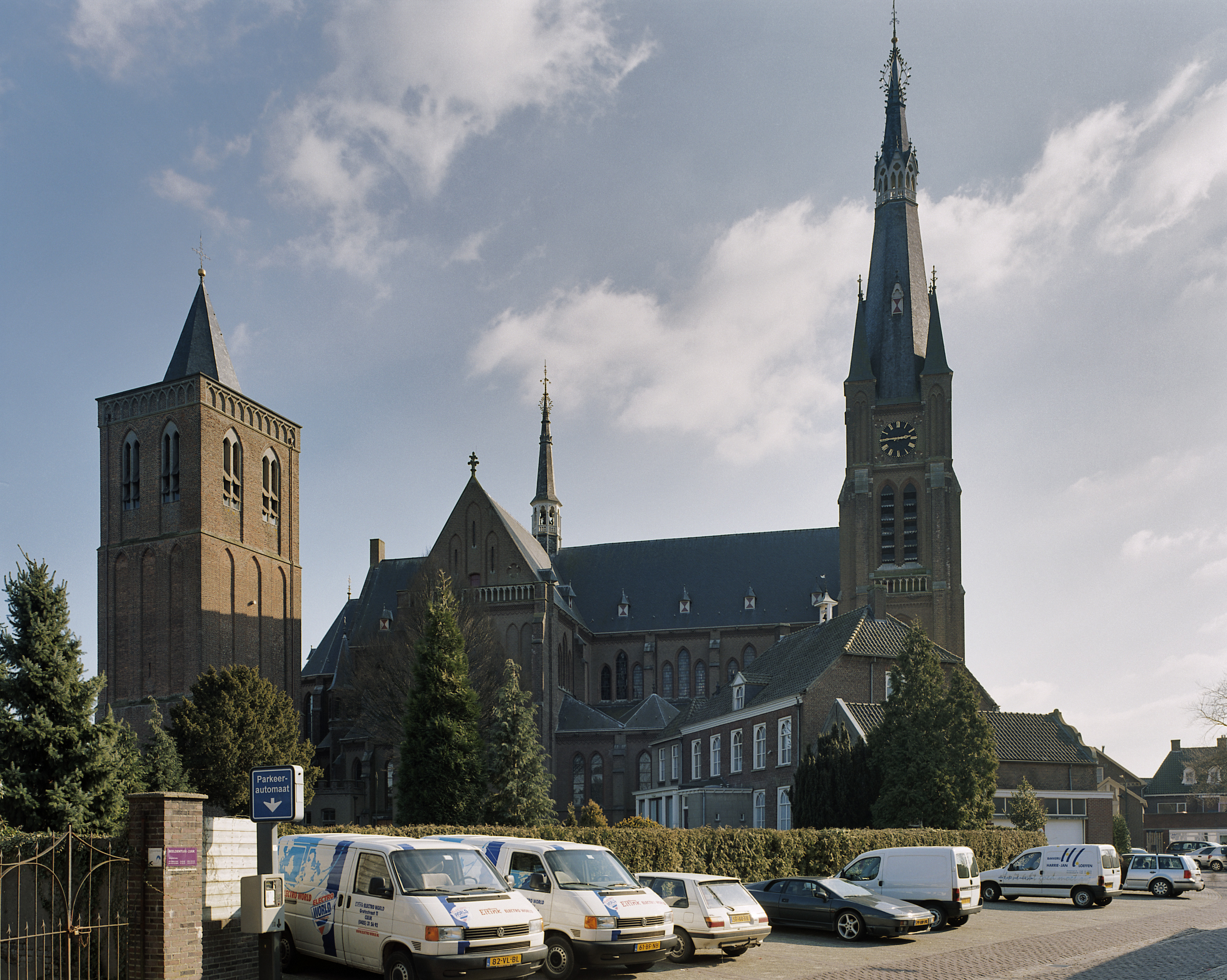 Sint Martinuskerk: Overzicht